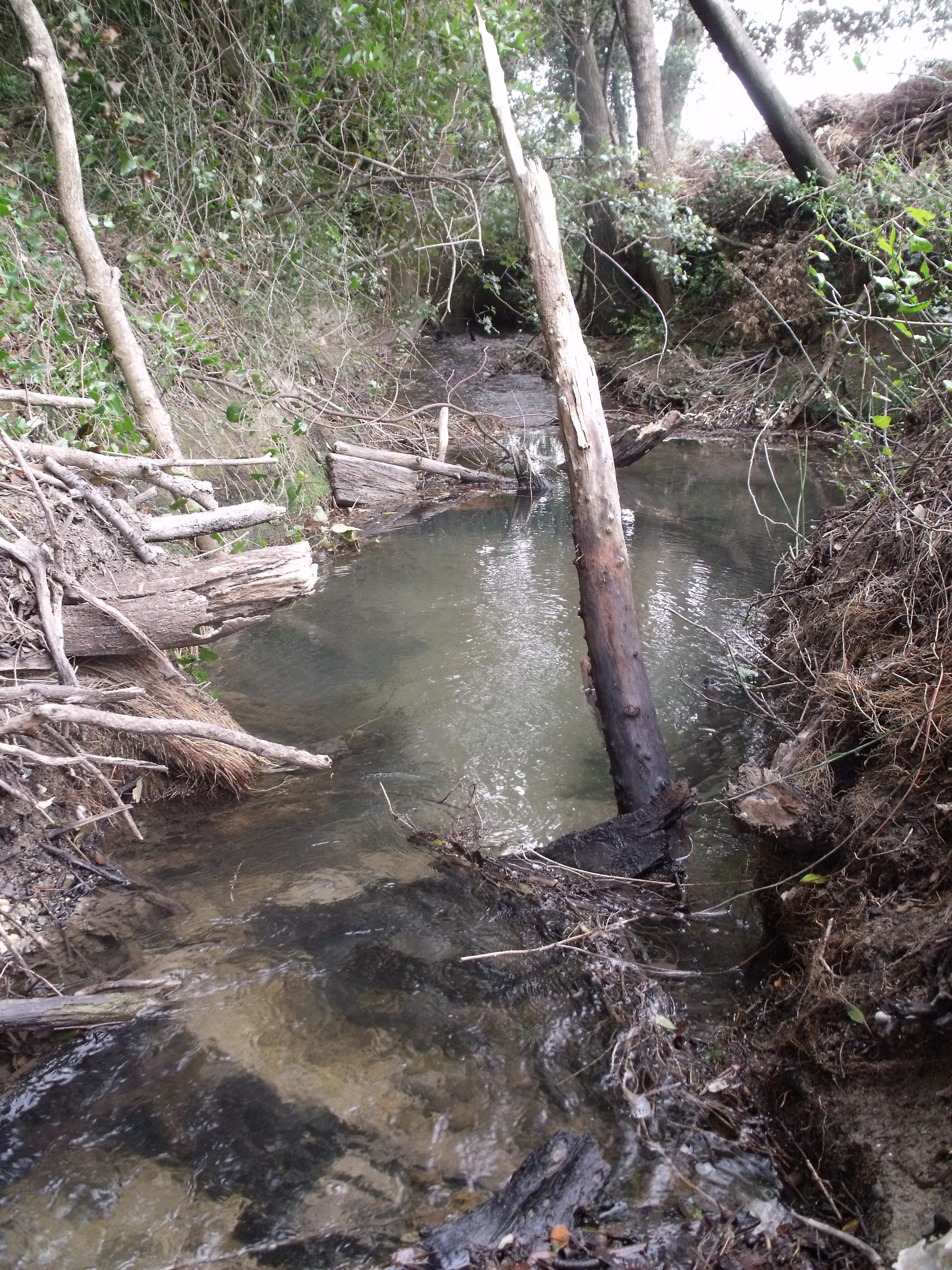 Gaudre d'Aureille. Photographie prise sur la commune de Mouriès (Bouches-du-Rhône).